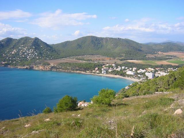 Canyamel in südwestlicher Richtung, von Cap Vermell aus fotografiert. Im Hintergrund die Berge der Serra de Son Jordi. Eigenes Bild.